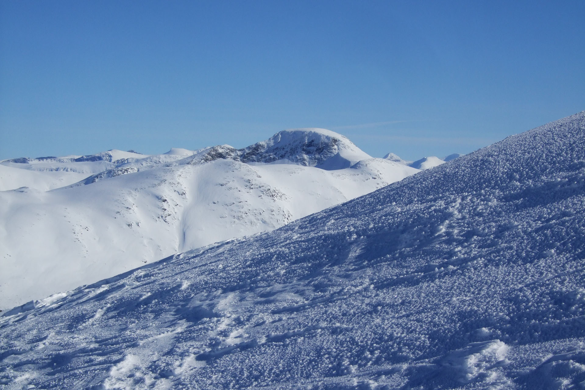 Holtefjellet og Mannefjellet sett frå Holskarhornet.